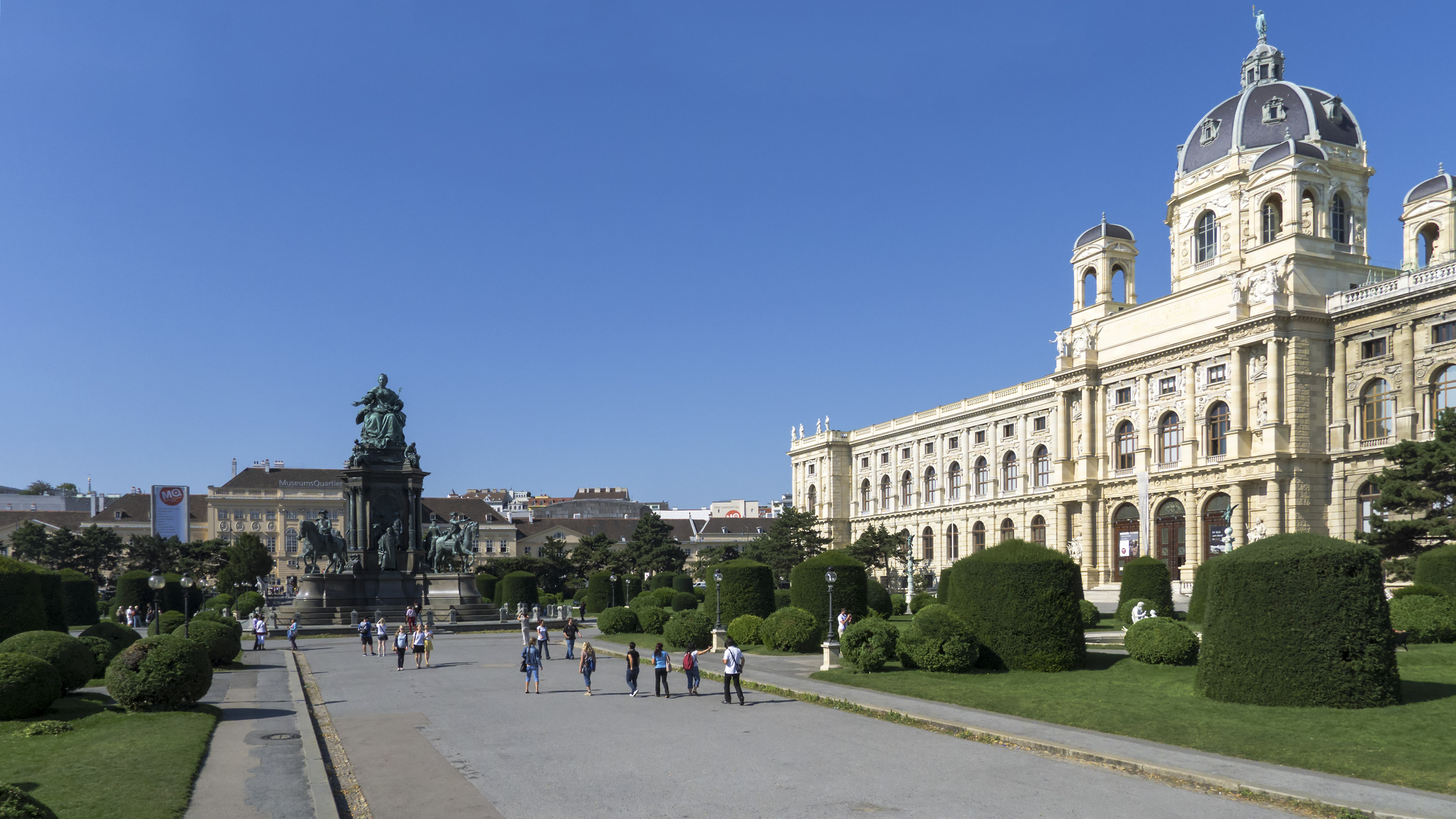 Maria-Theresien-Platz in Wien 1 Richtung Südwesten